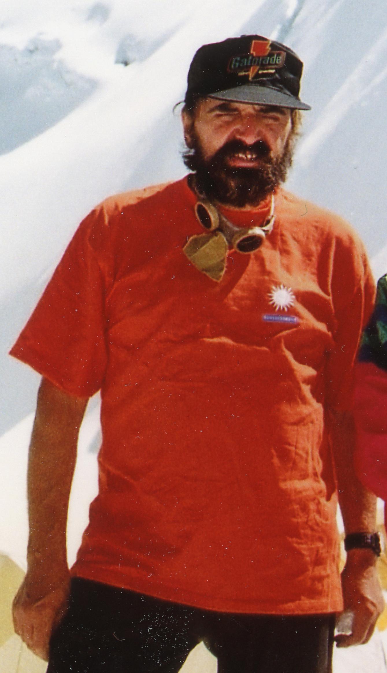 Arne Sarapuu